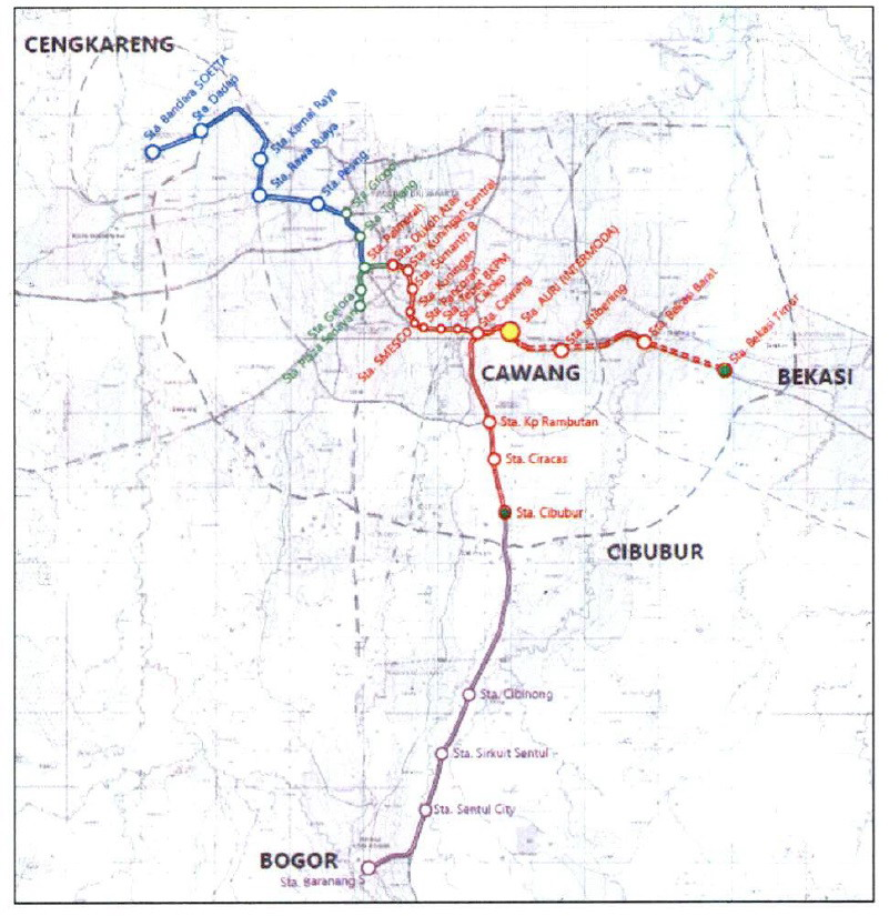 Plan du futur métro léger de Jakarta